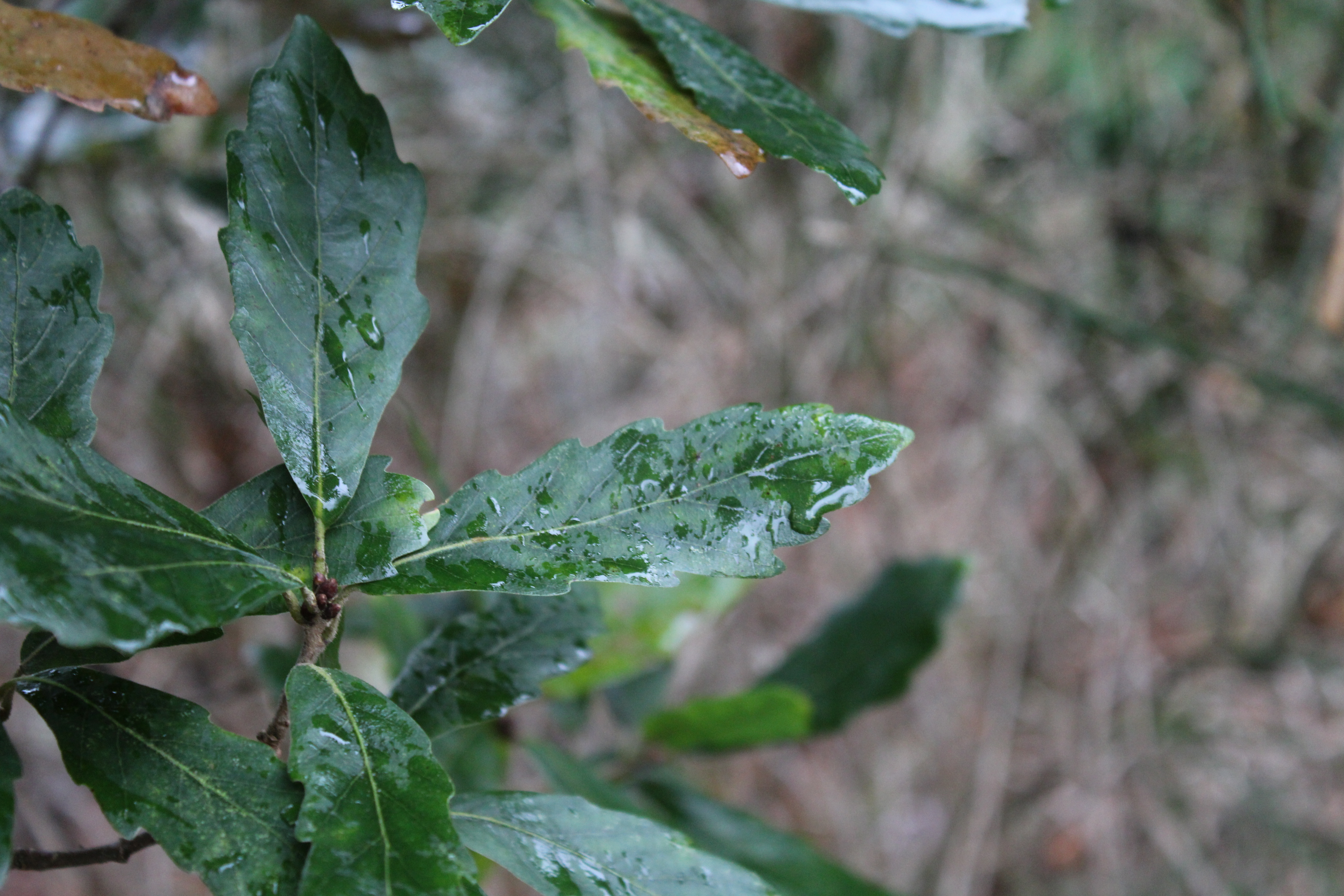 Blätter der Imemrgrünen Eiche